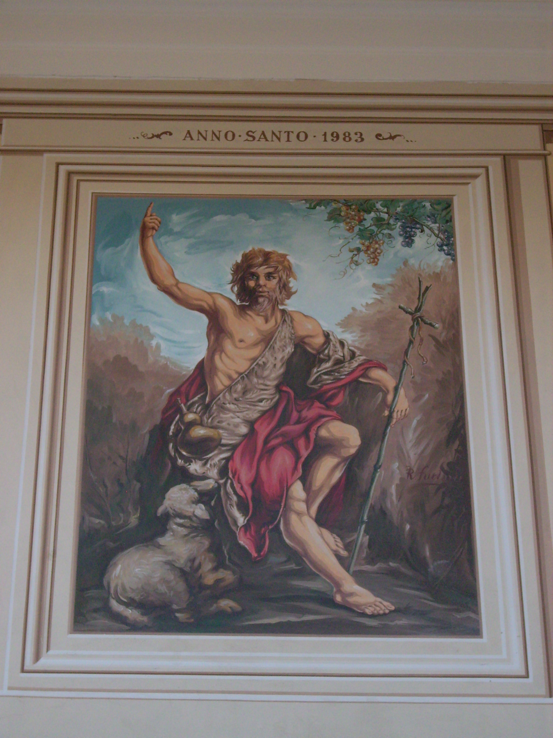 Affresco dell'oratorio di San Giovanni Battista, Cogorno, Liguria, Italy